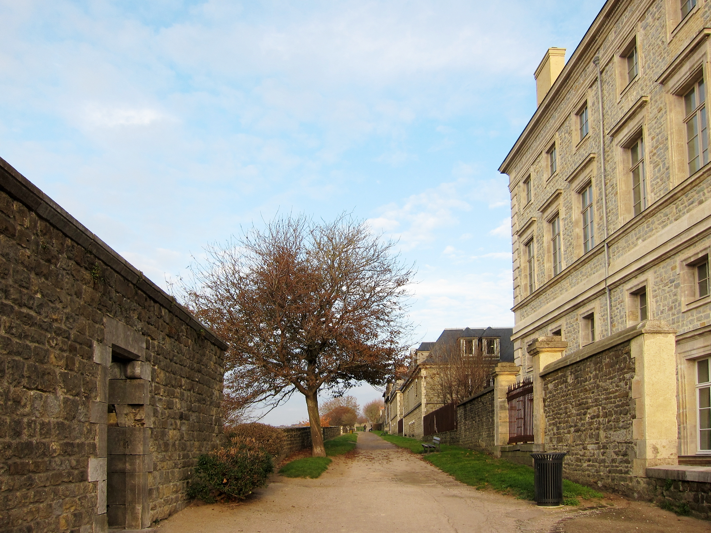 La promenade des remparts à Boulogne-sur-Mer.